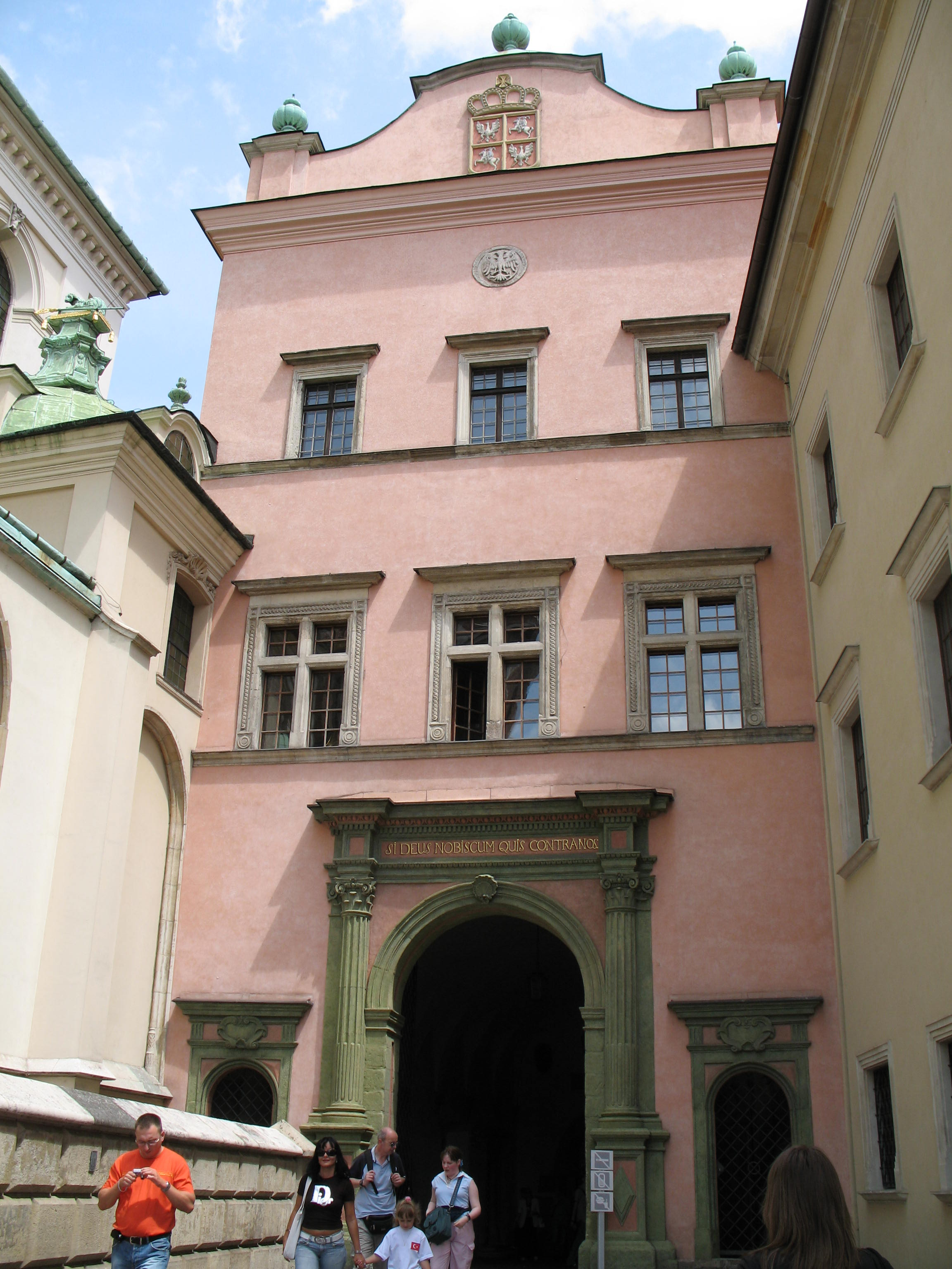 Wawel in Kraków, Poland